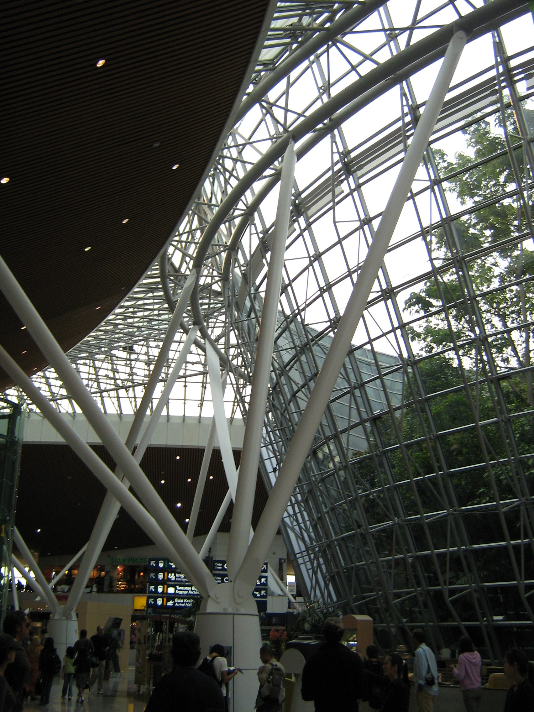 Mitte des Satelittengebäudes am KLIA